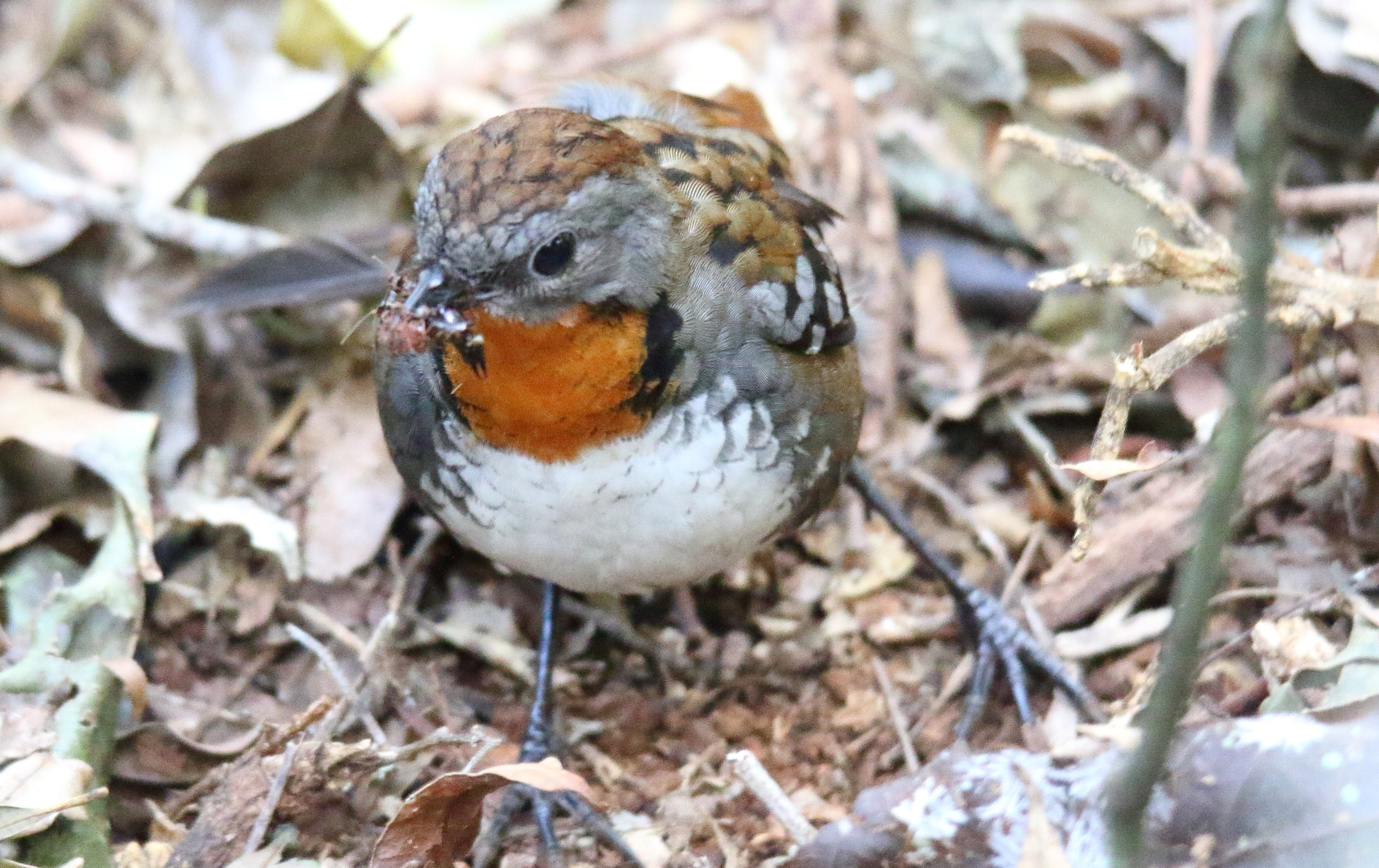 female